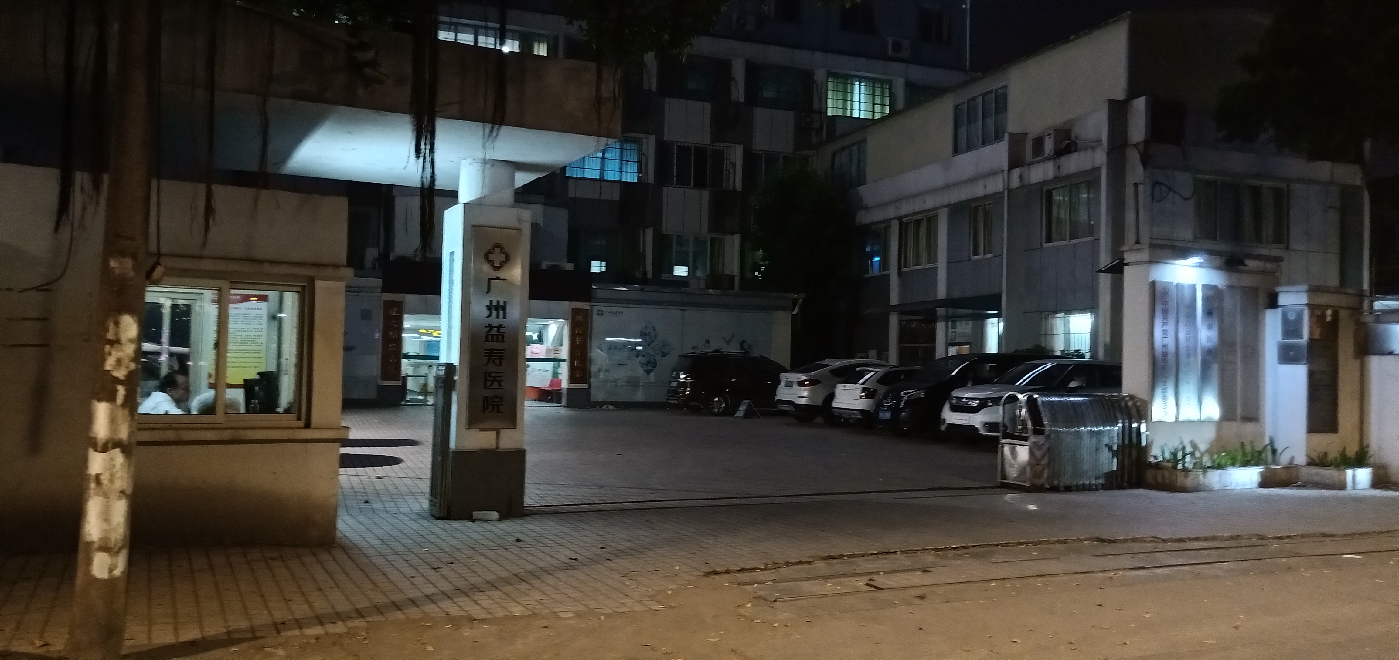 粵語: 廣州益壽醫院